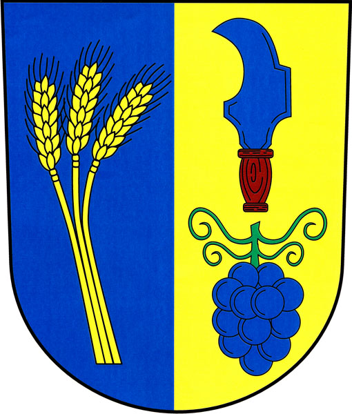 Znak obce Odrovice